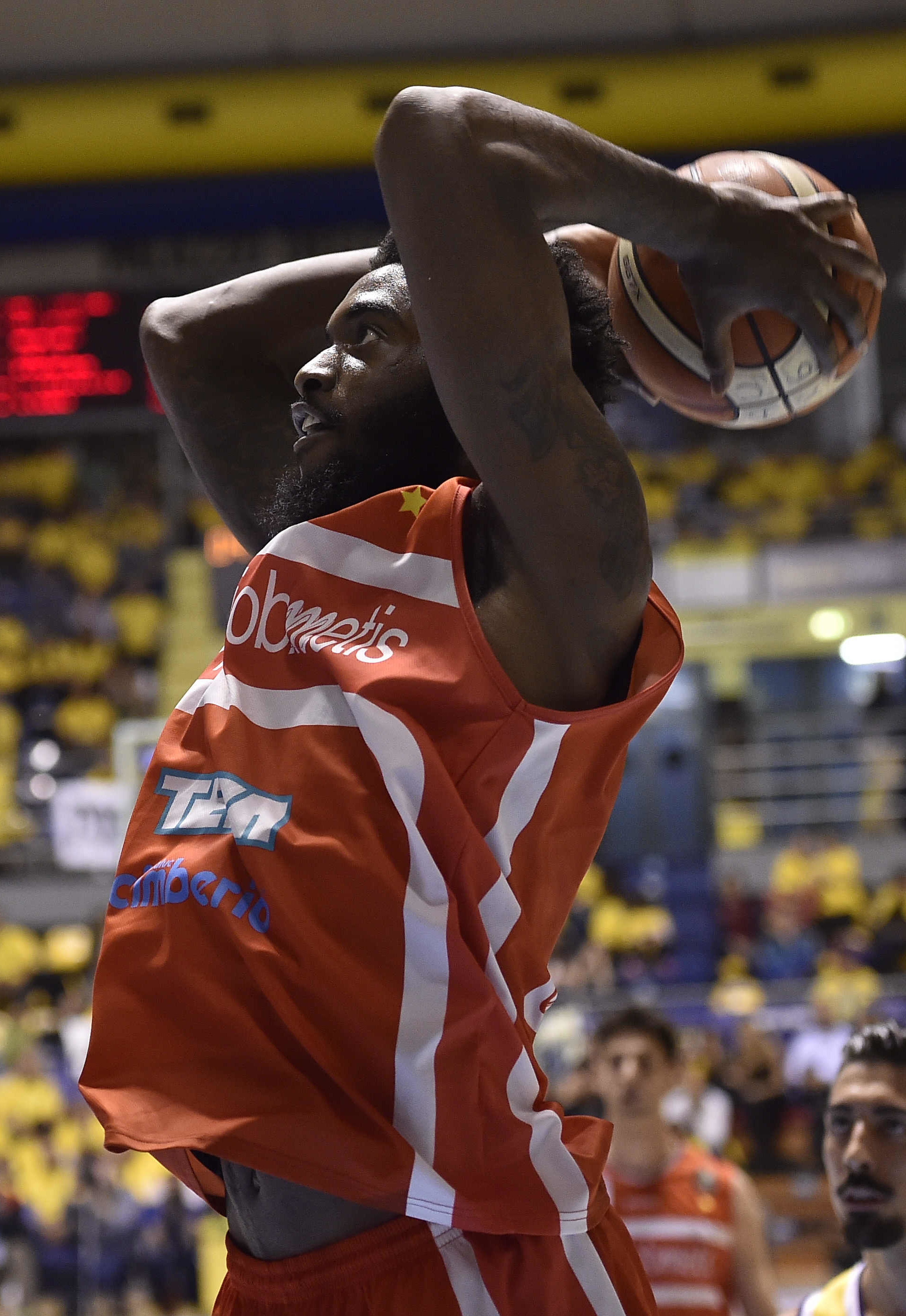 Pelle Norvel FIAT Torino - Openjobmetis Varese Lega Basket Serie A 2016-2017 Torino 07/05/2017 Foto Ciamillo-Castoria/M.Matta